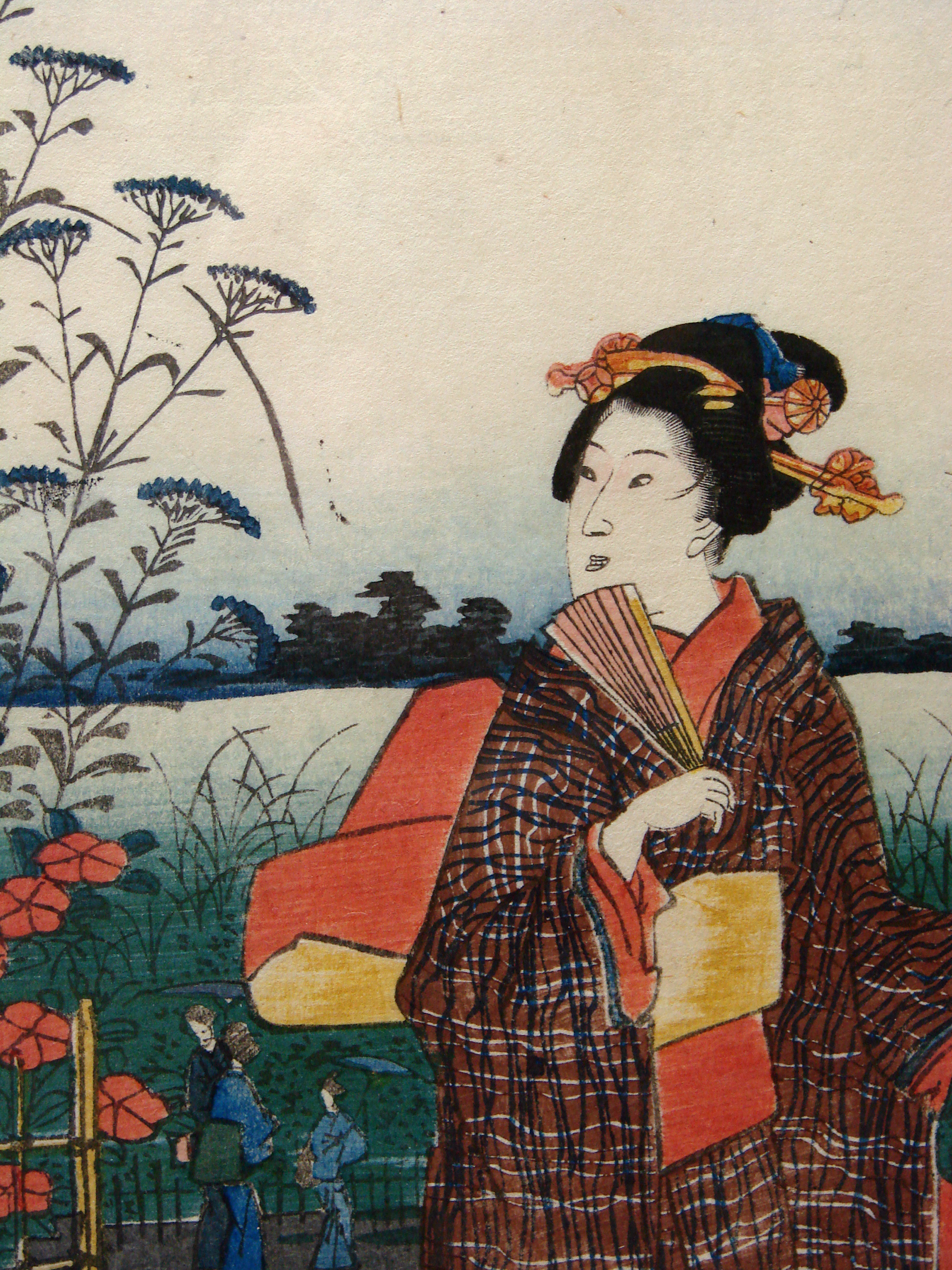 Illustration du Genji Monogatari, 19ème siècle (détail). Musée Saint-Remi à Reims.